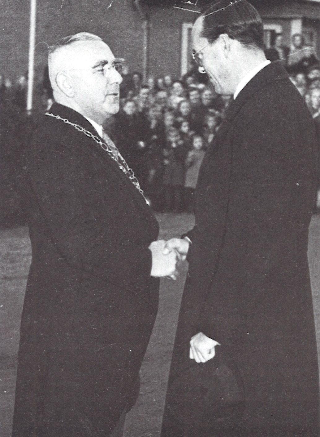 Gerrit Abraham van Engelen 12 oktober 1949 en Z.K.H. prins Bernhard officieel bezoek aan Zwolle, Kampen, IJsselmuiden en Grafhorst